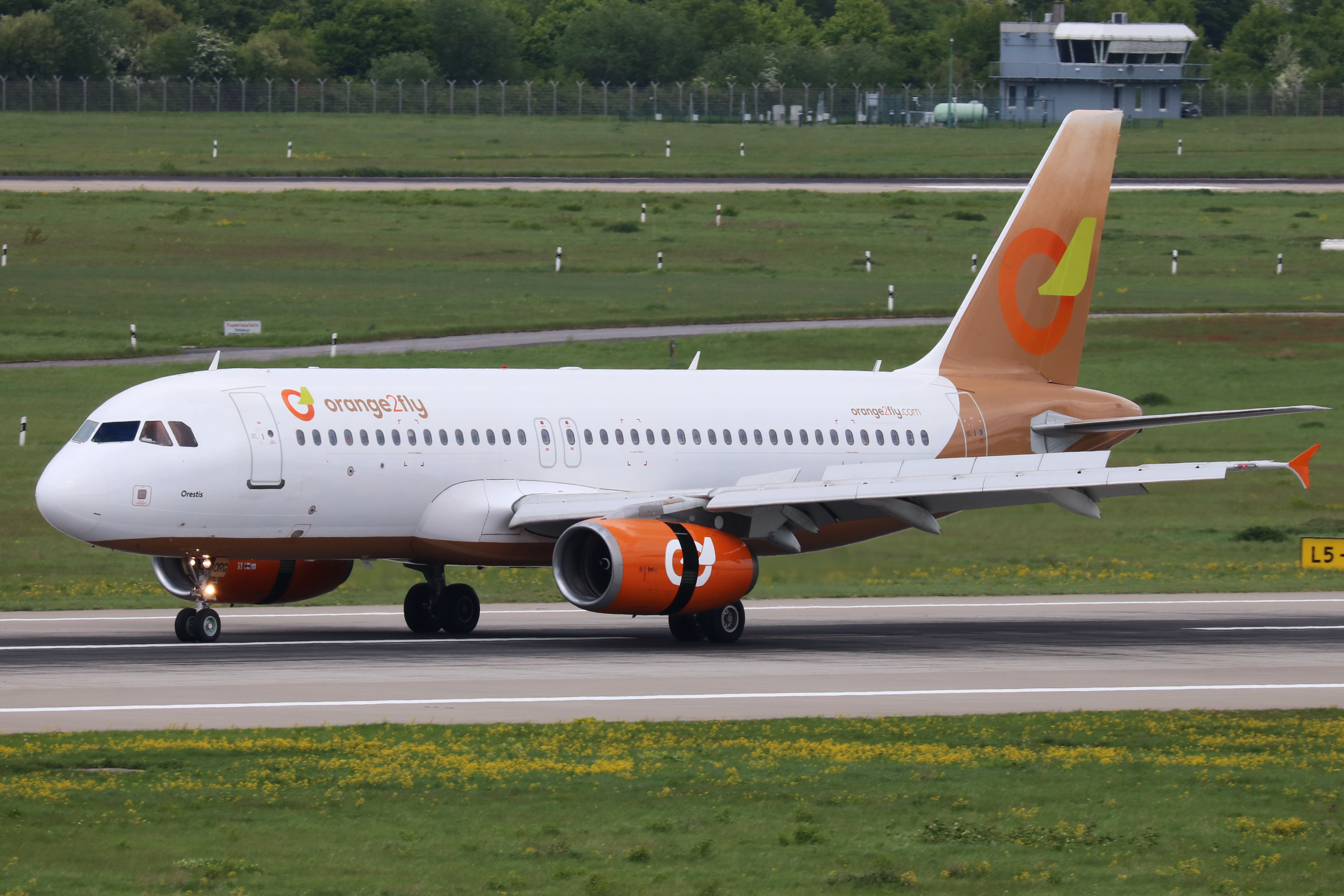 Flughafen Düsseldorf, Airbus A320-200 (SX-ORG) der Orange2Fly